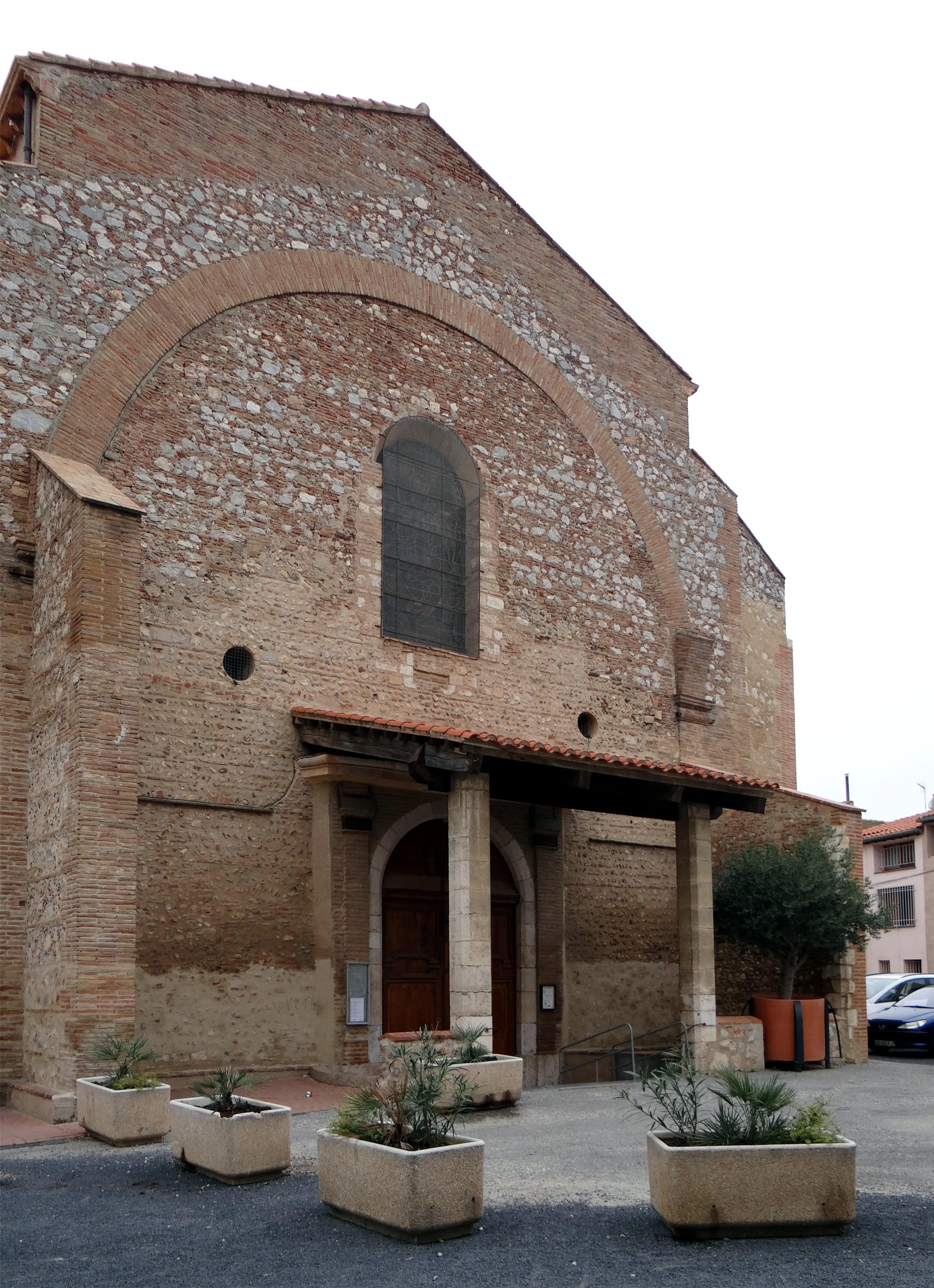 Église Saint-Laurent, Saint-Laurent-de-la-Salanque, Pyrénées-Orientales, France.